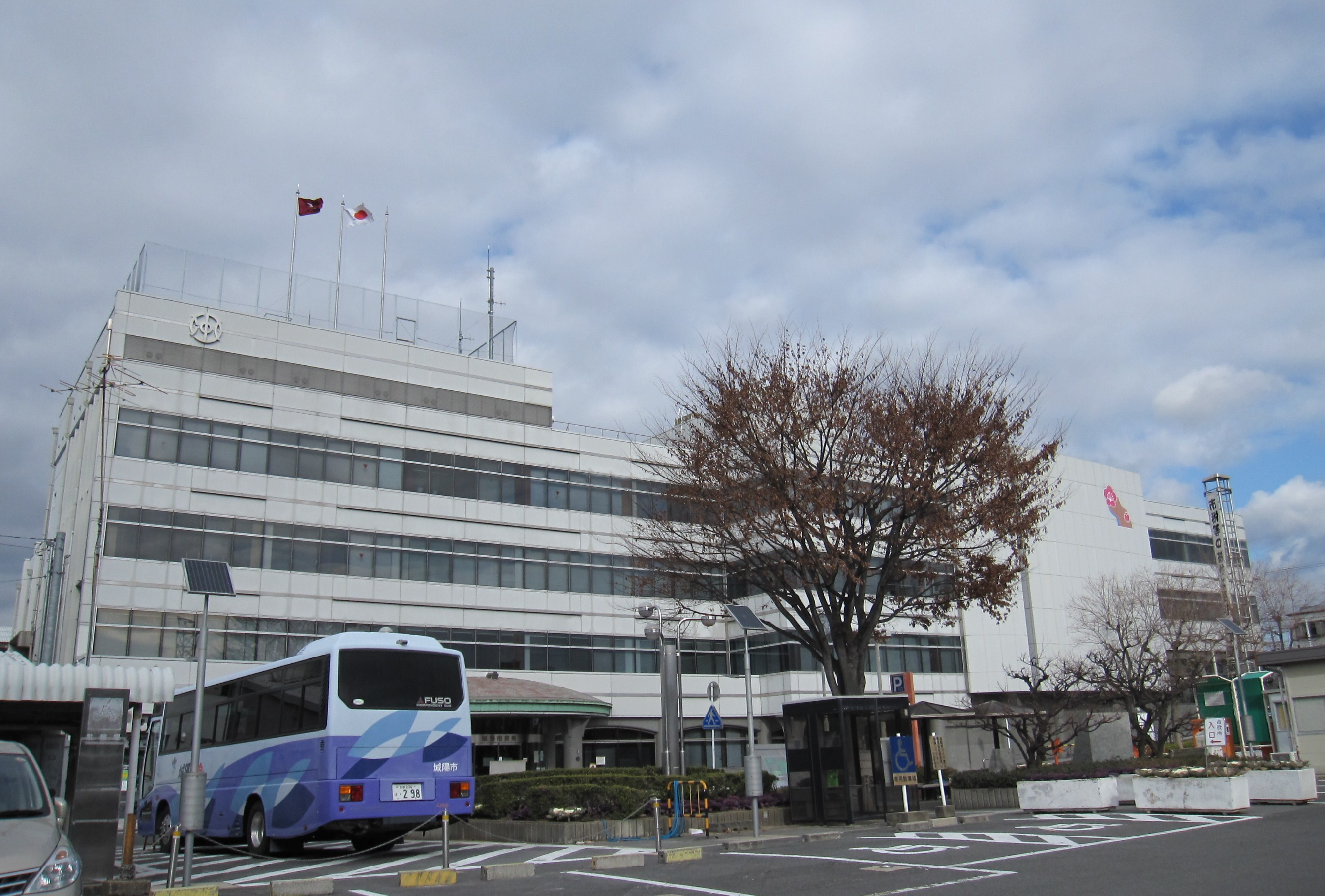 城陽市役所